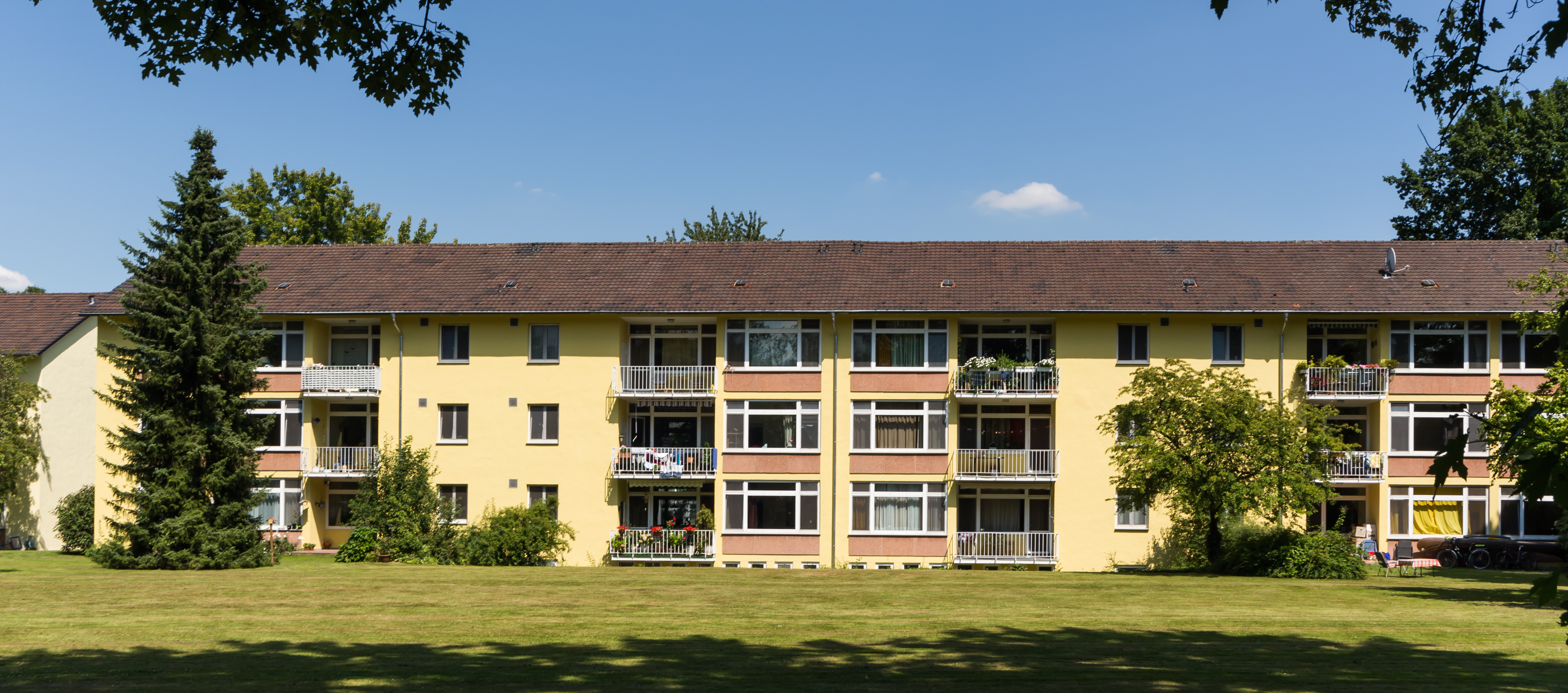 Europastraße 9–11, Bonn-Plittersdorf – ein typisches Mehrfamilienhaus der HICOG-Siedlung Plittersdorf (Ansicht aus Westen, Gartenseite)